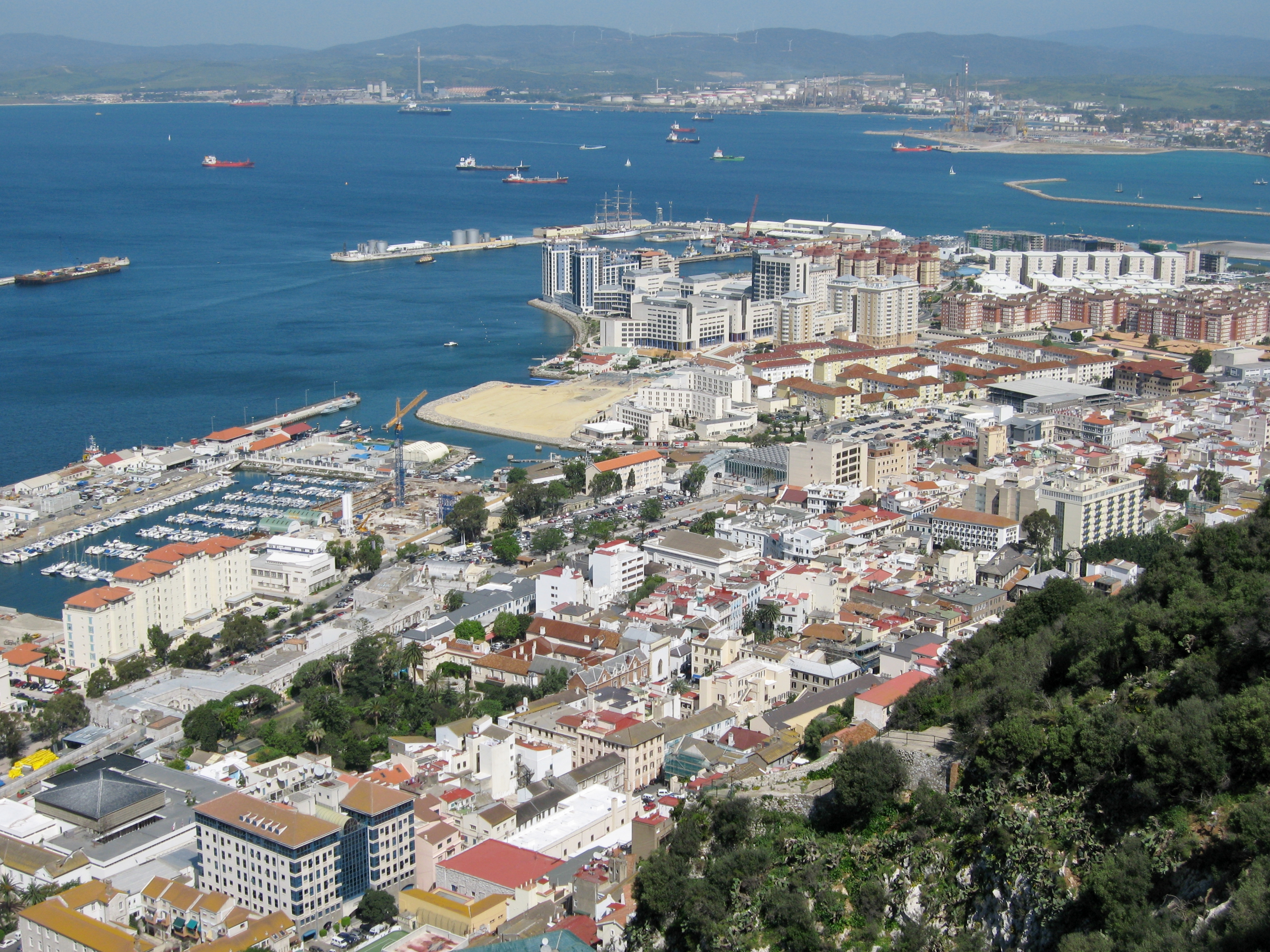 Hafen von Gibraltar